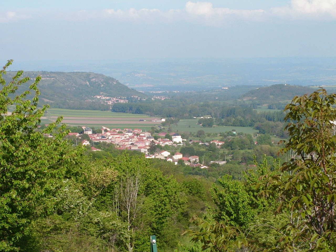 Chidrac (63) dans le paysage. Vu depuis Lavelle, commune de St Vincent Photo prise le 14 mai 2005 par F5ZV